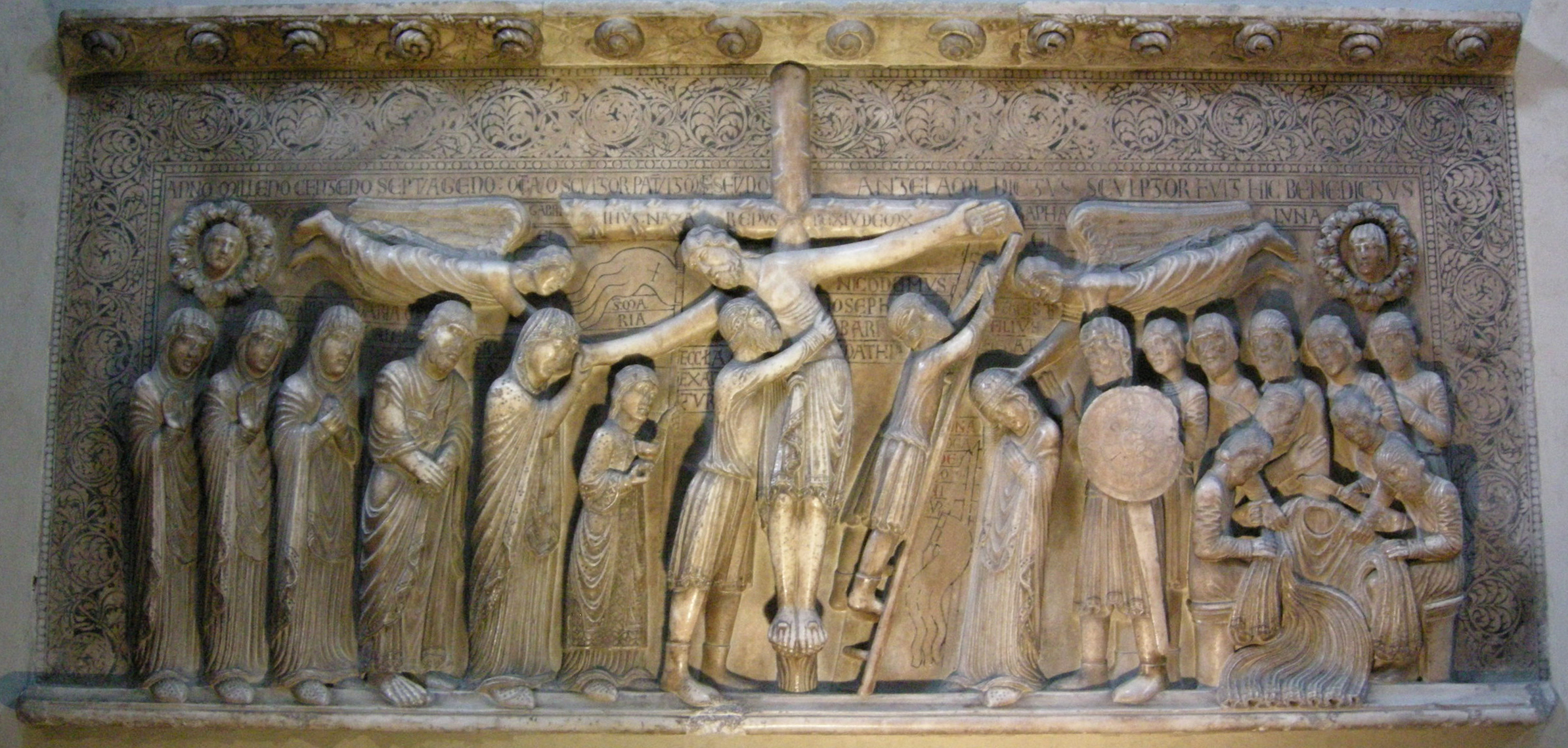 Deposizione dalla croce di benedetto antelami